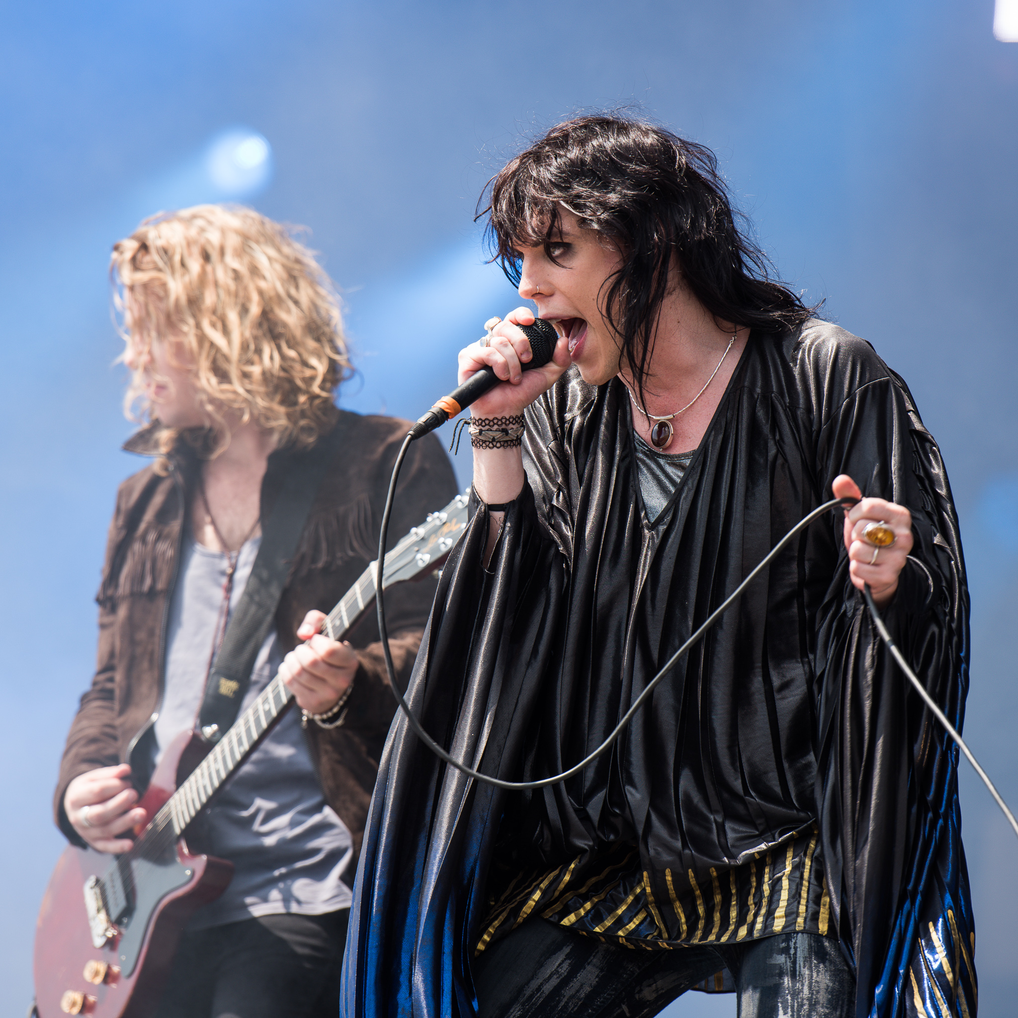 ARGO-Konzerte,Adam Slack,Festival,Konzert,Livekonzert,Livemusik,Luke Spiller,Musik,RiP,Rock im Park 2016,Seat Zeppelin Stage,The Struts